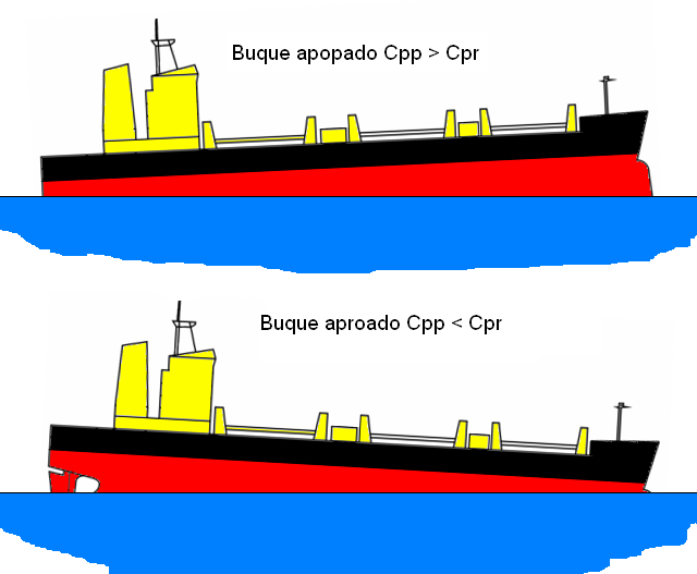 Aft draft over forward draft & vice versa (spanish)